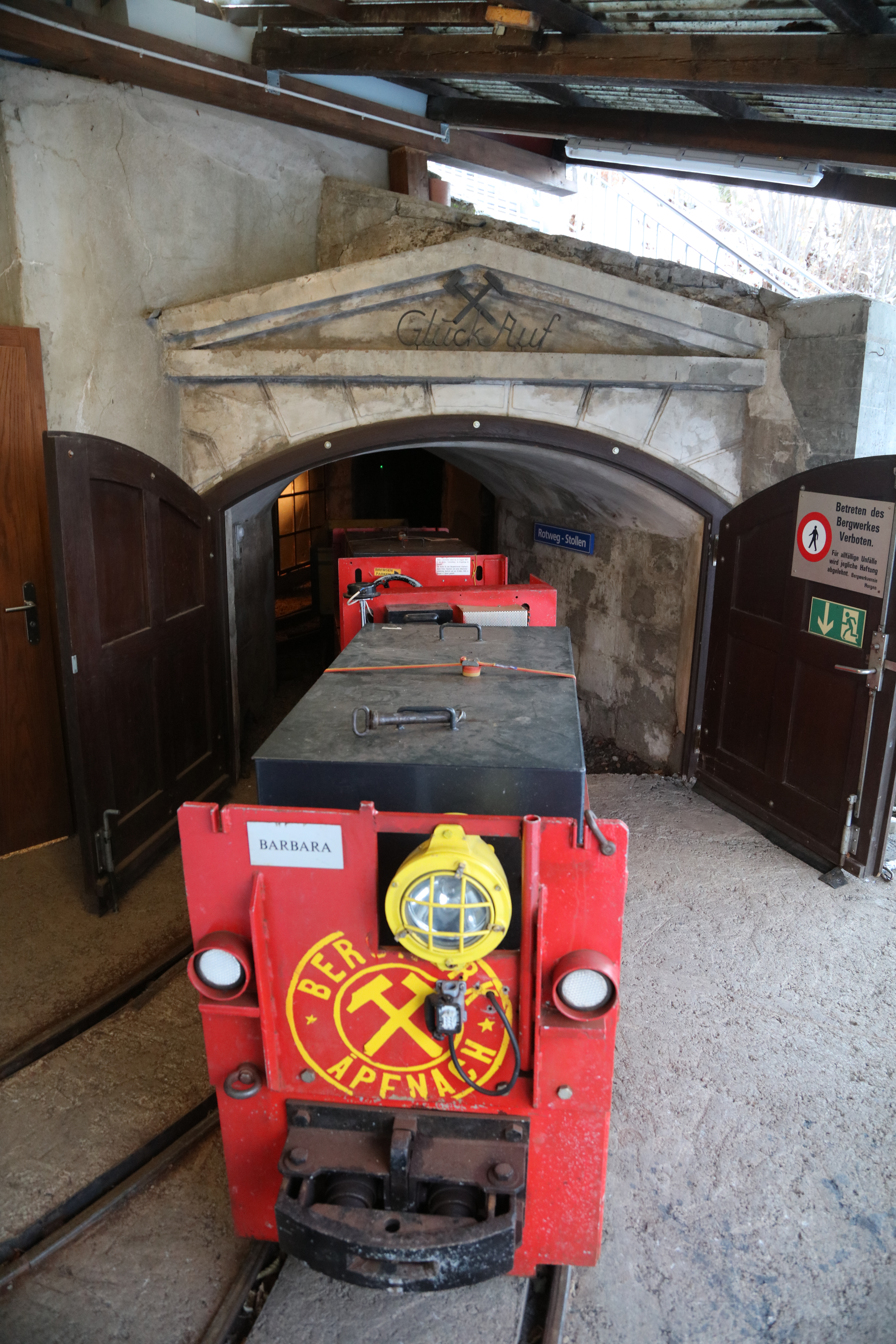 Das Bergwerk Käpfnach in Horgen. Rotweg-Stollen Mund mit Akkulokomotiven